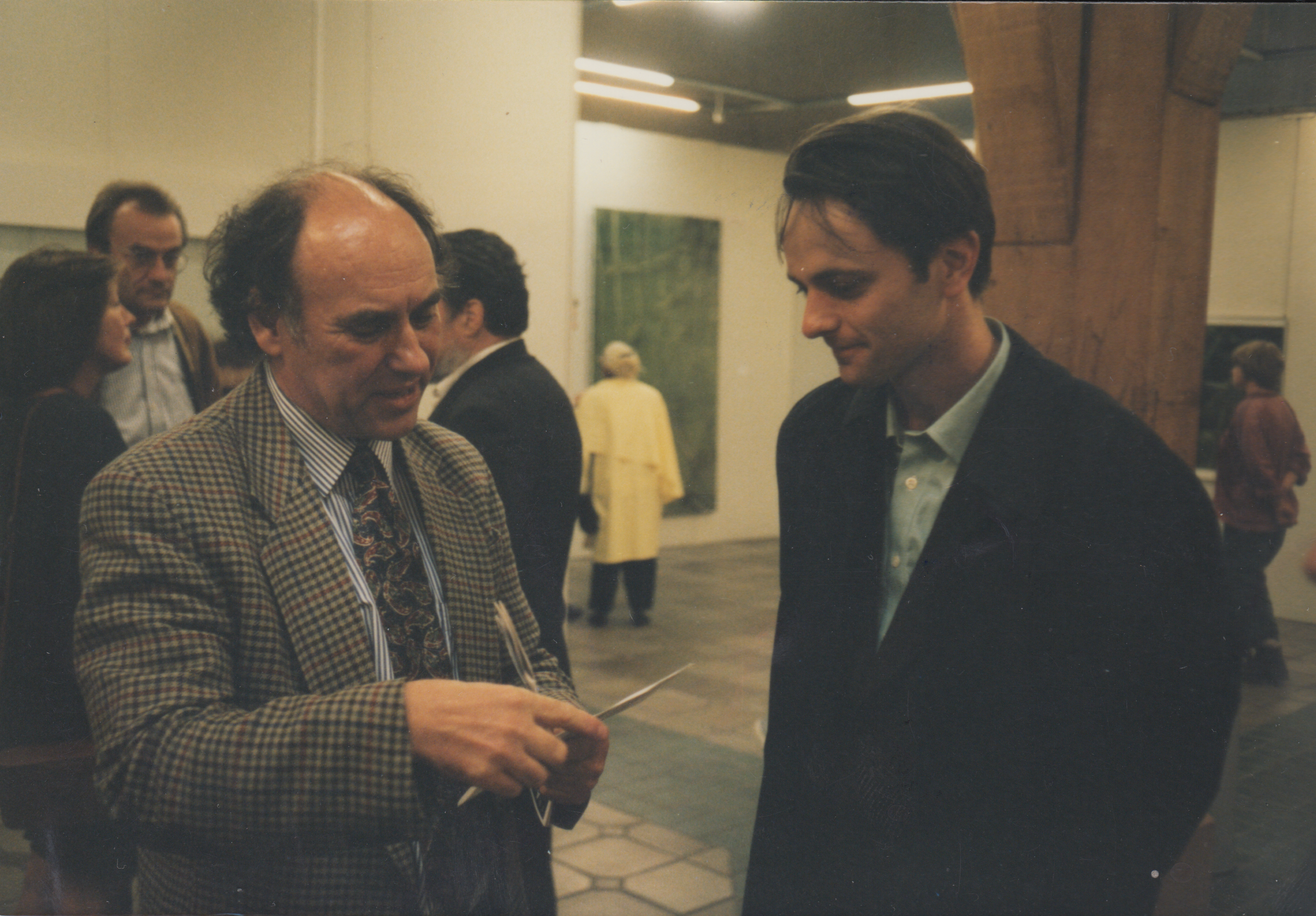 Vernissage Cornelius Völker 1996